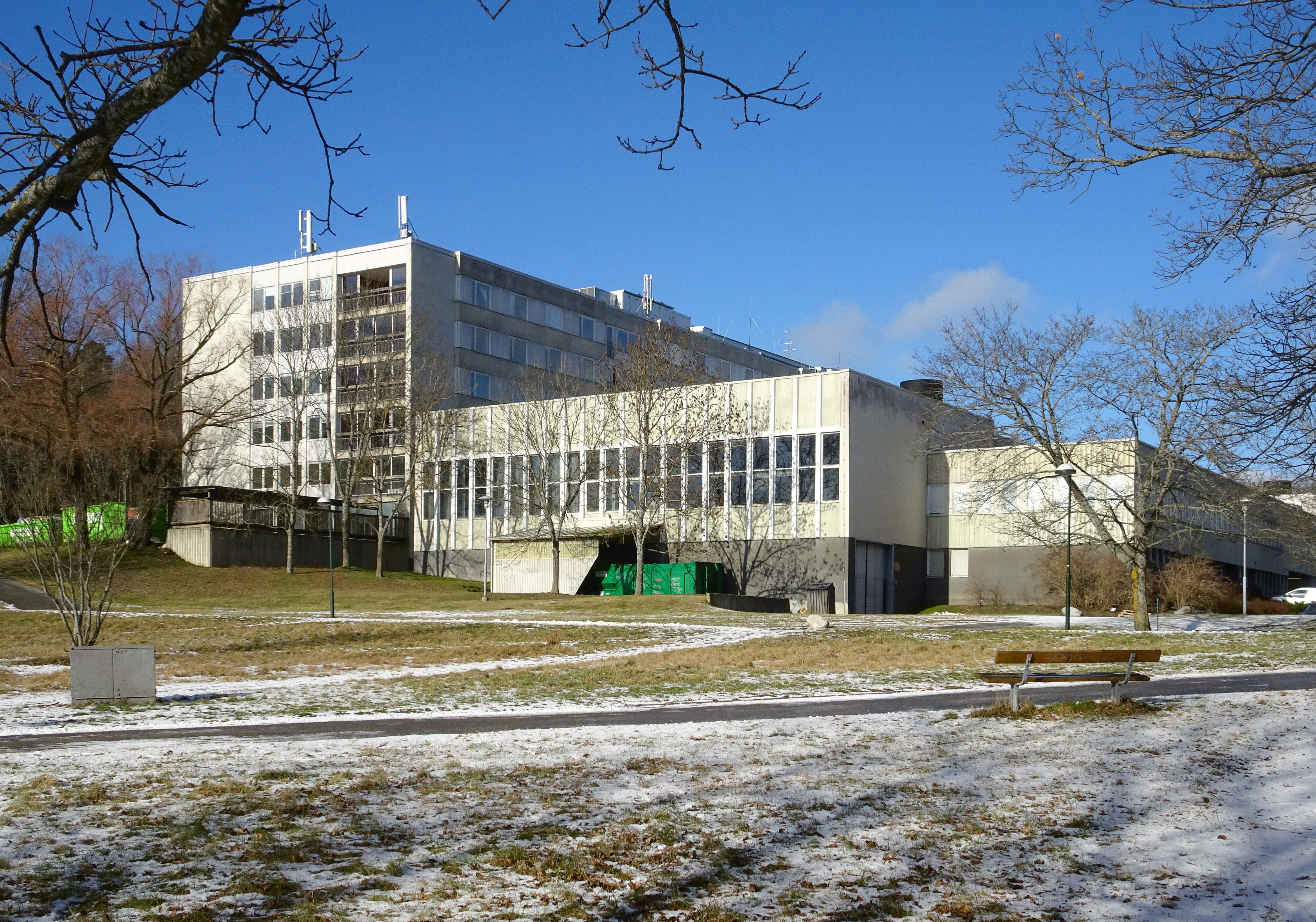 Vårbergs sjukhem byggdes 1970 som ett sjukhus, ritat av arkitekten Ervin Pütseps arkitektkontor. 1994-1996 byggdes det om till ett sjukhem för äldre med den verksamheten avvecklades 2010.